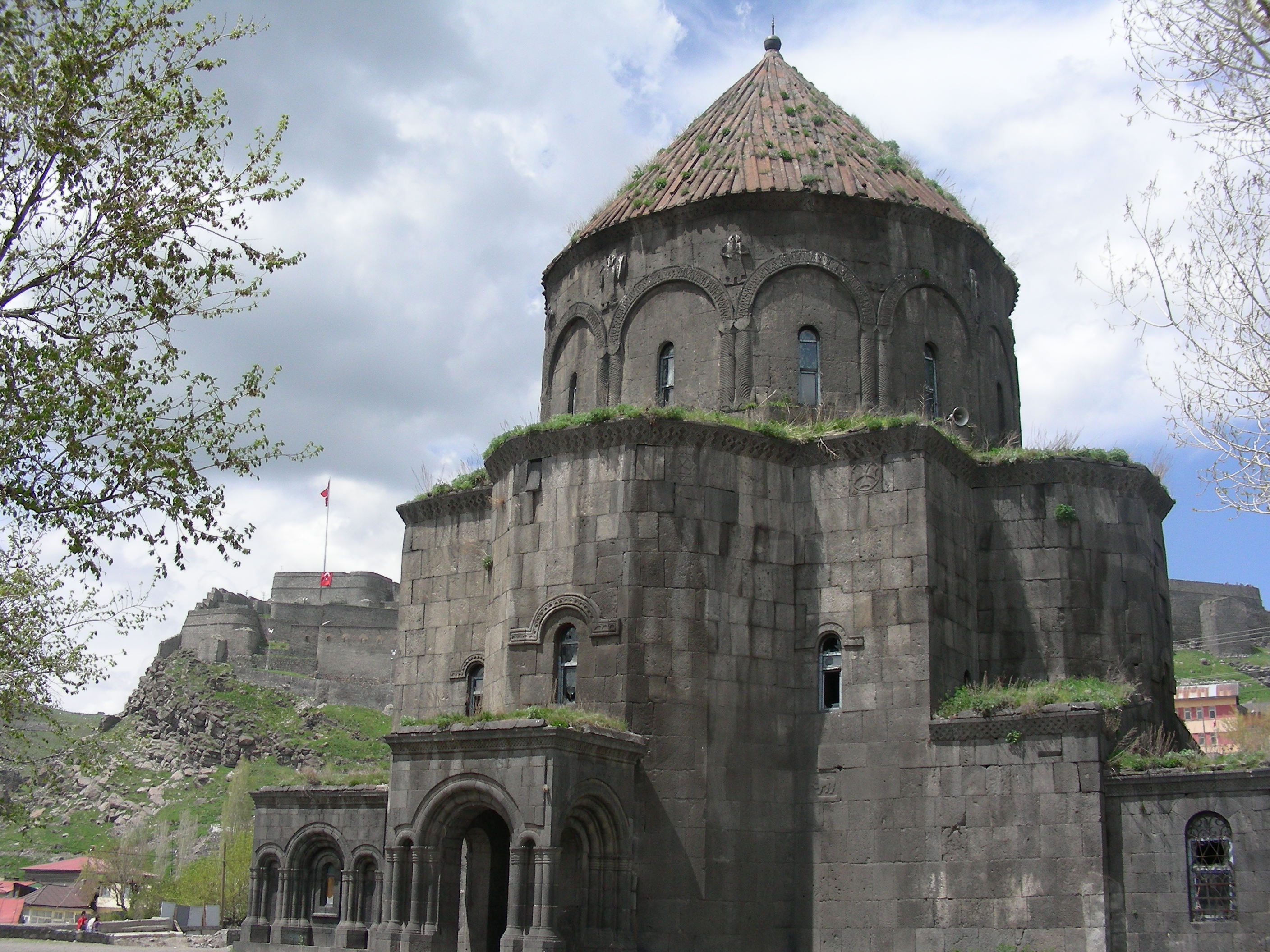 Kars, armenische Kathedrale, Heilige-Apostel-Kirche / Սուրբ Առաքելոց Եկեղեցի (10. Jhdt.)